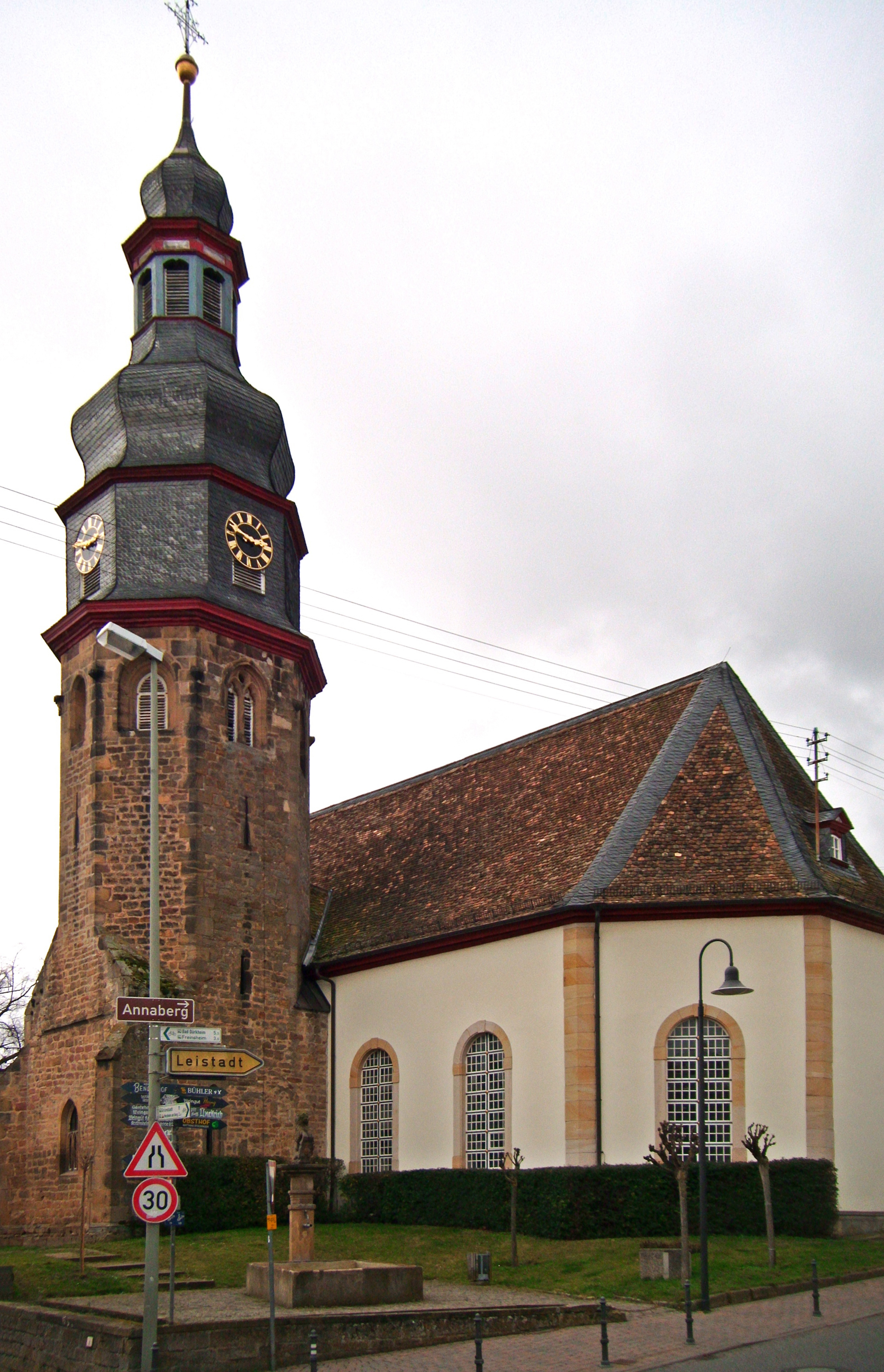 Protestantische Salvatorkirche Kallstadt, Rheinland-Pfalz